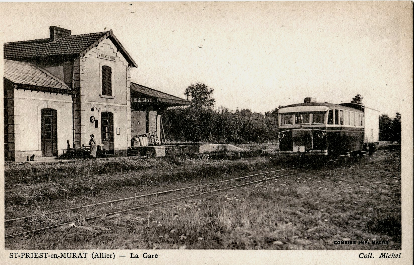 Carte postale ancienne éditée par Combier, imp. à Macon, collection Michel : Saint-Priest-en-Murat - La Gare